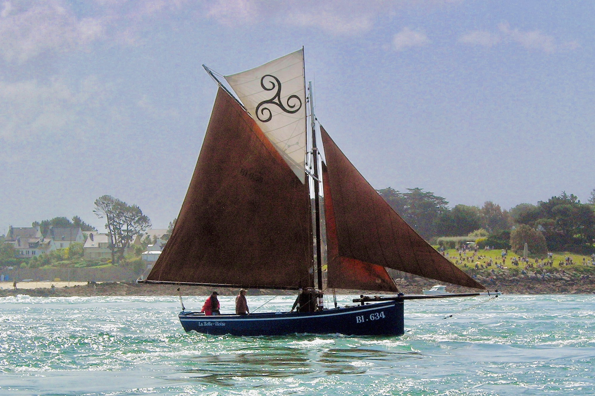 La Belle-Iloise